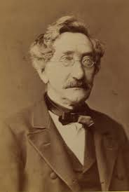 Karel Würbs (1807 - 1876), Český kreslíř, malíř, litograf a pedagog.